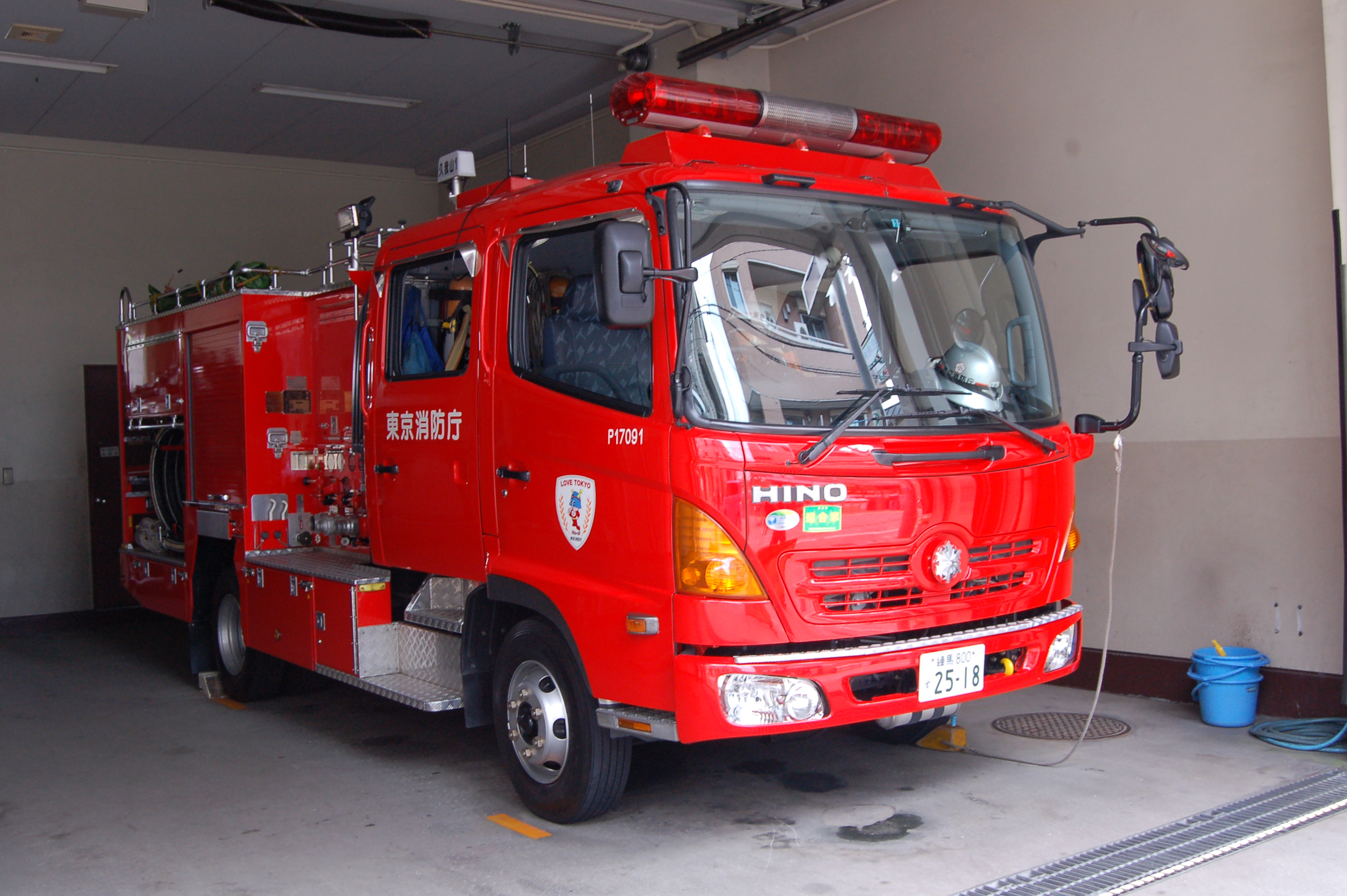 東京消防庁荻窪消防署久我山出張所久我山1。